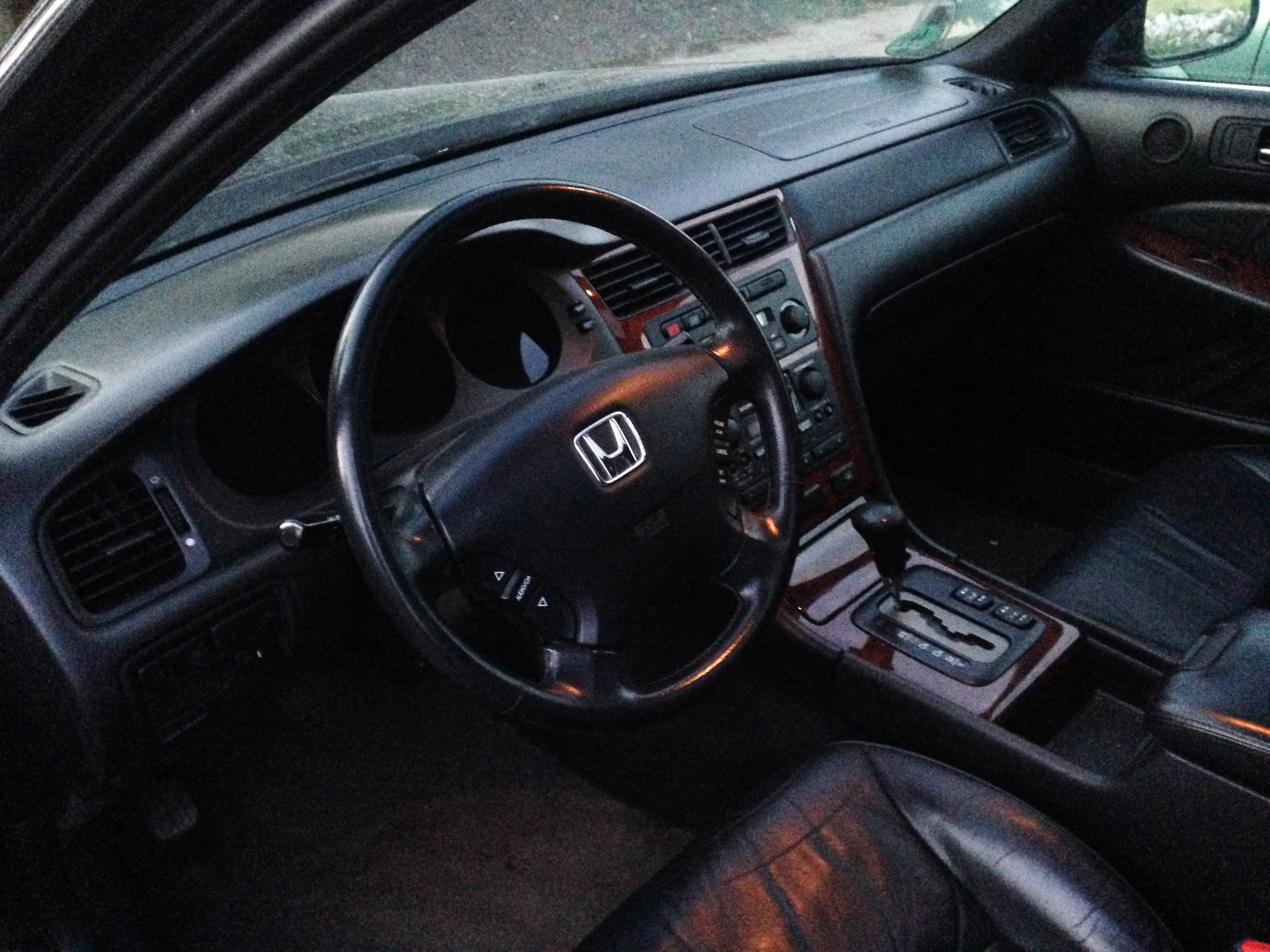 Wnętrze Hondy Legend KA9 po liftingu